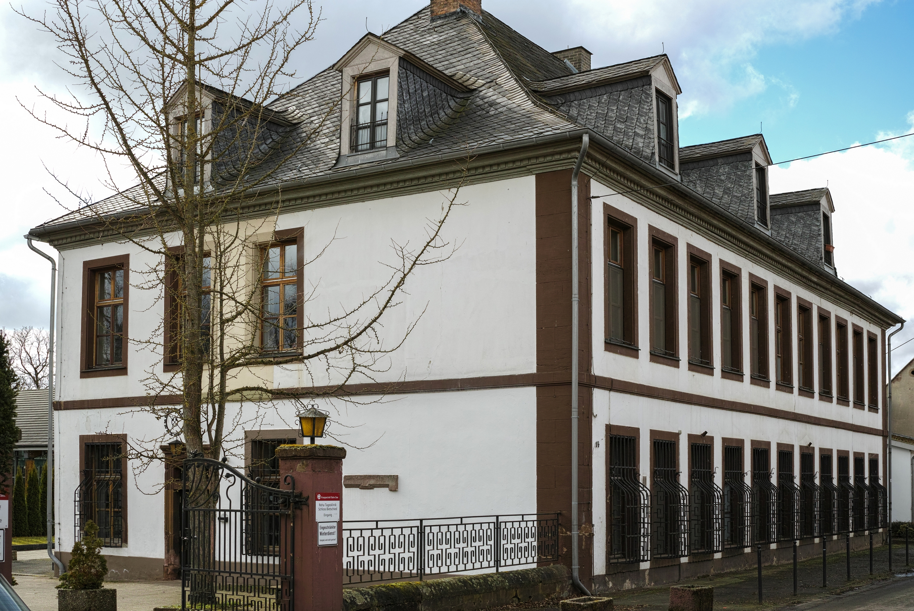 Schloss Bietschied, Heusweiler, Regionalverband Saarbrücken